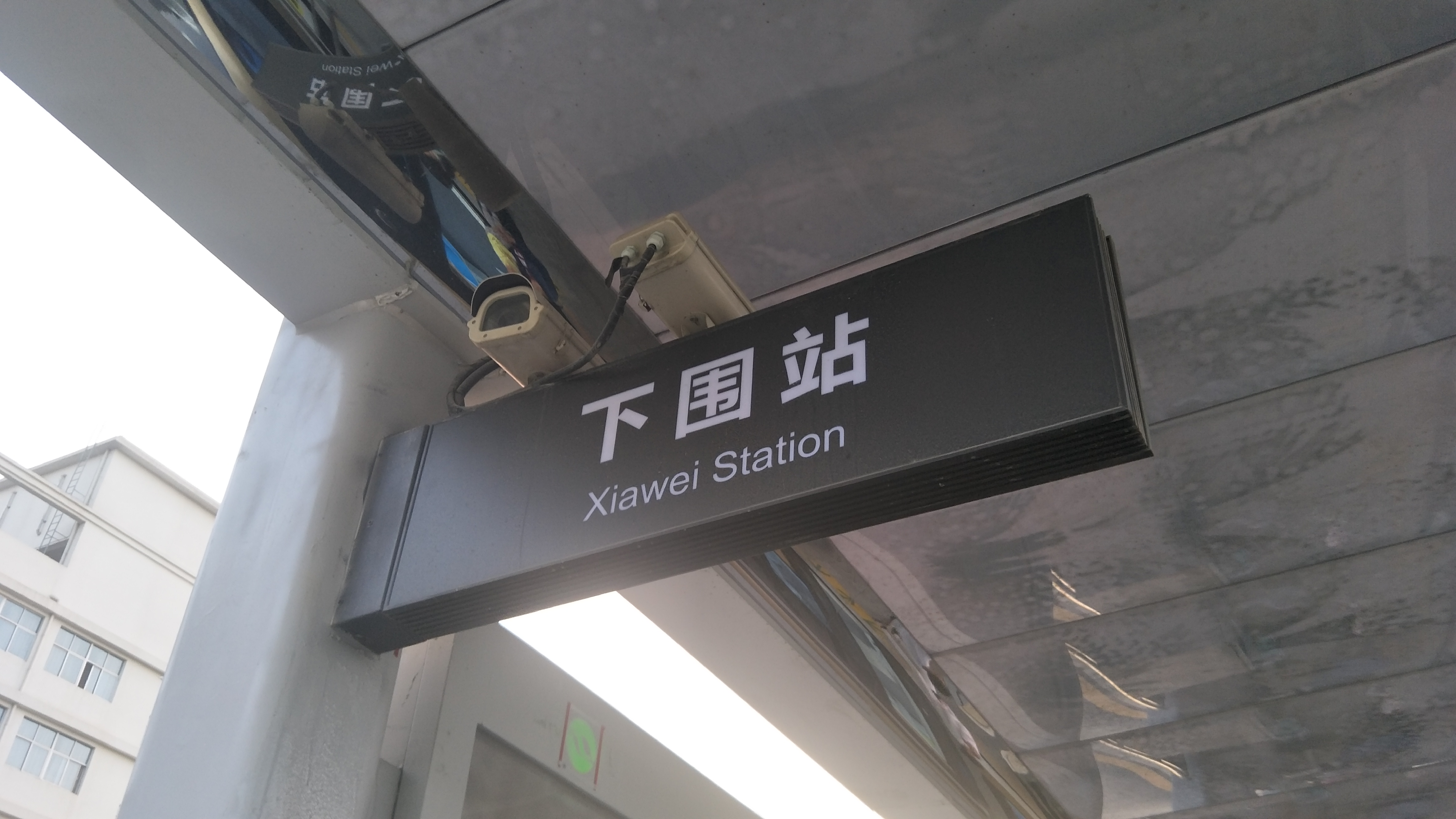 深圳有轨电车下围站站名牌